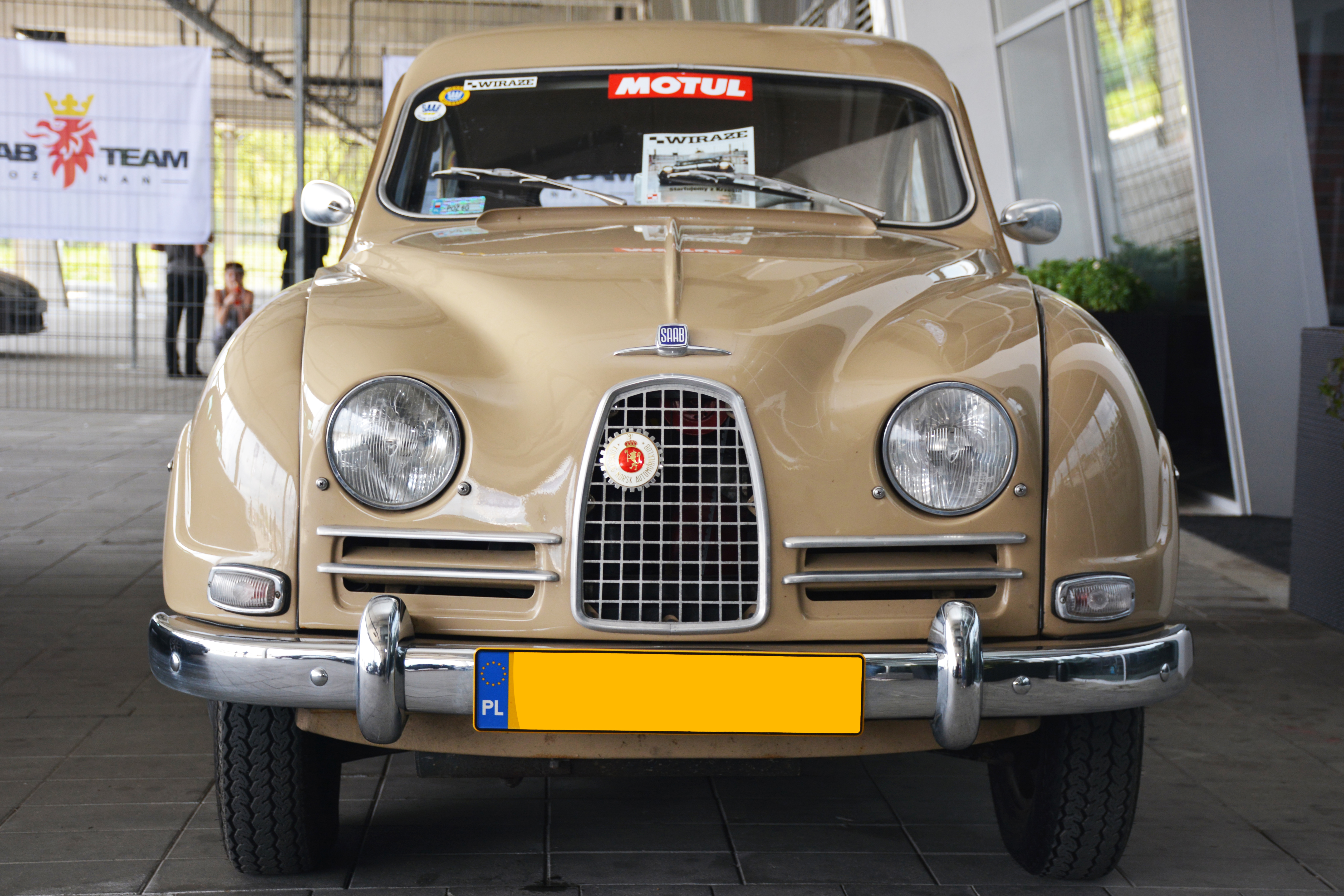 Saab 93B przód